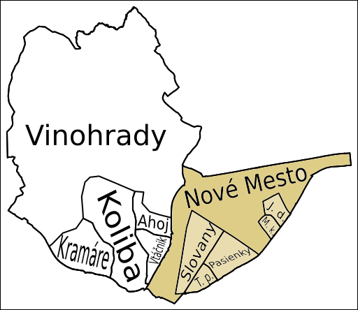 Nové Mesto, Nové Mesto, Bratislava